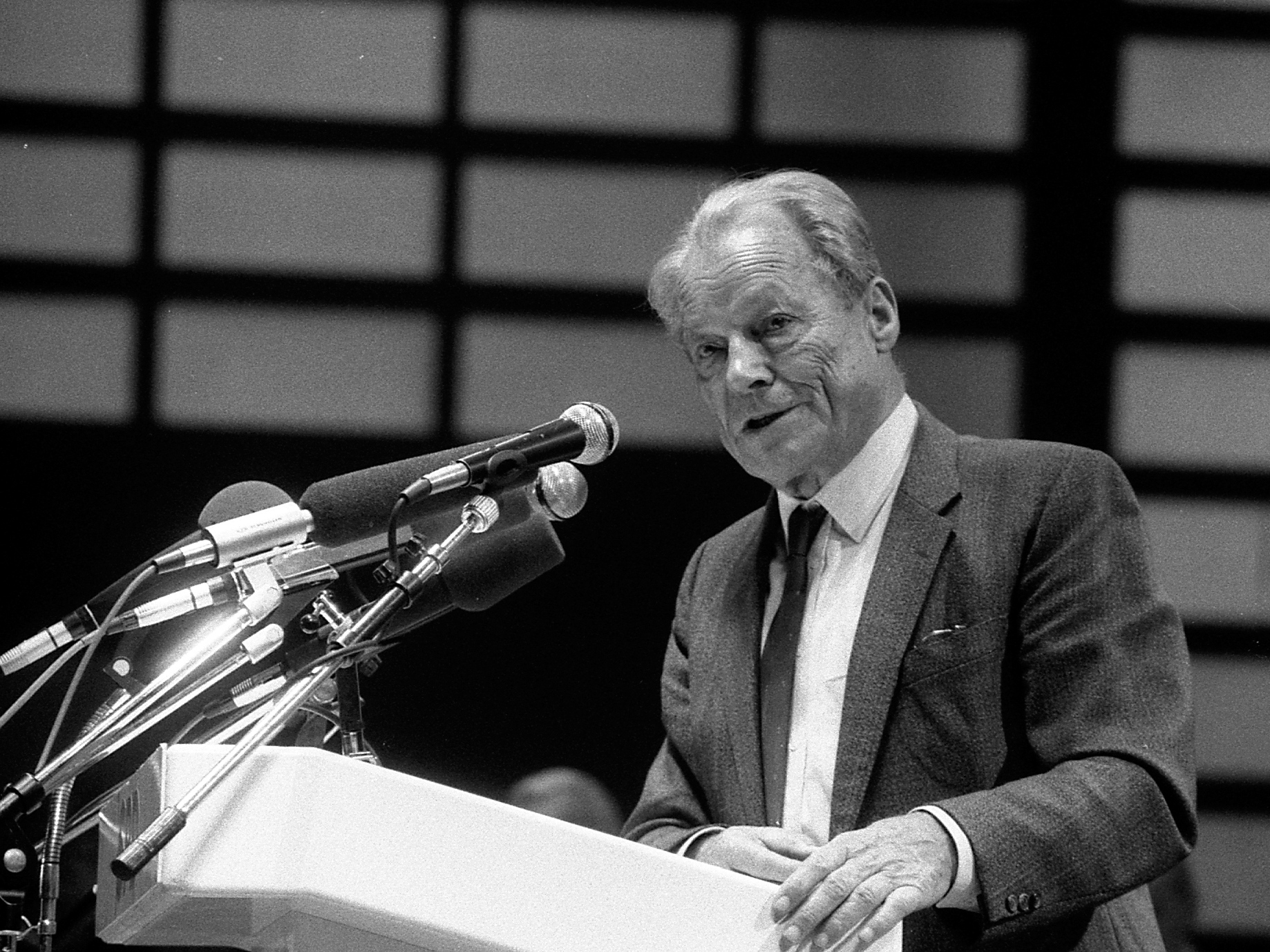 Willy Brandt, deutscher Politiker (SPD), Bundeskanzler (1969-74)